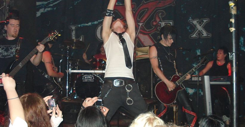 Lovex - fiński zespół rockowy/rock'n'rollowy powstały na przełomie 2001-2002r. w Tampere..